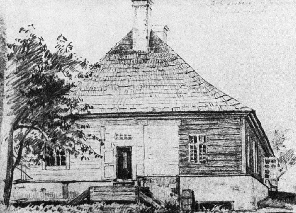 Беларуская (тарашкевіца): Дудзічы (Dudzičy), сядзіба Ельскіх (Jelski)